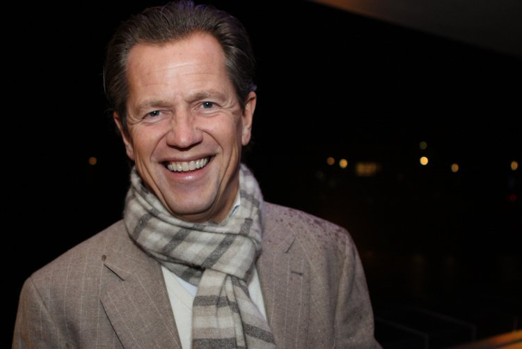 Directeur 538 Group